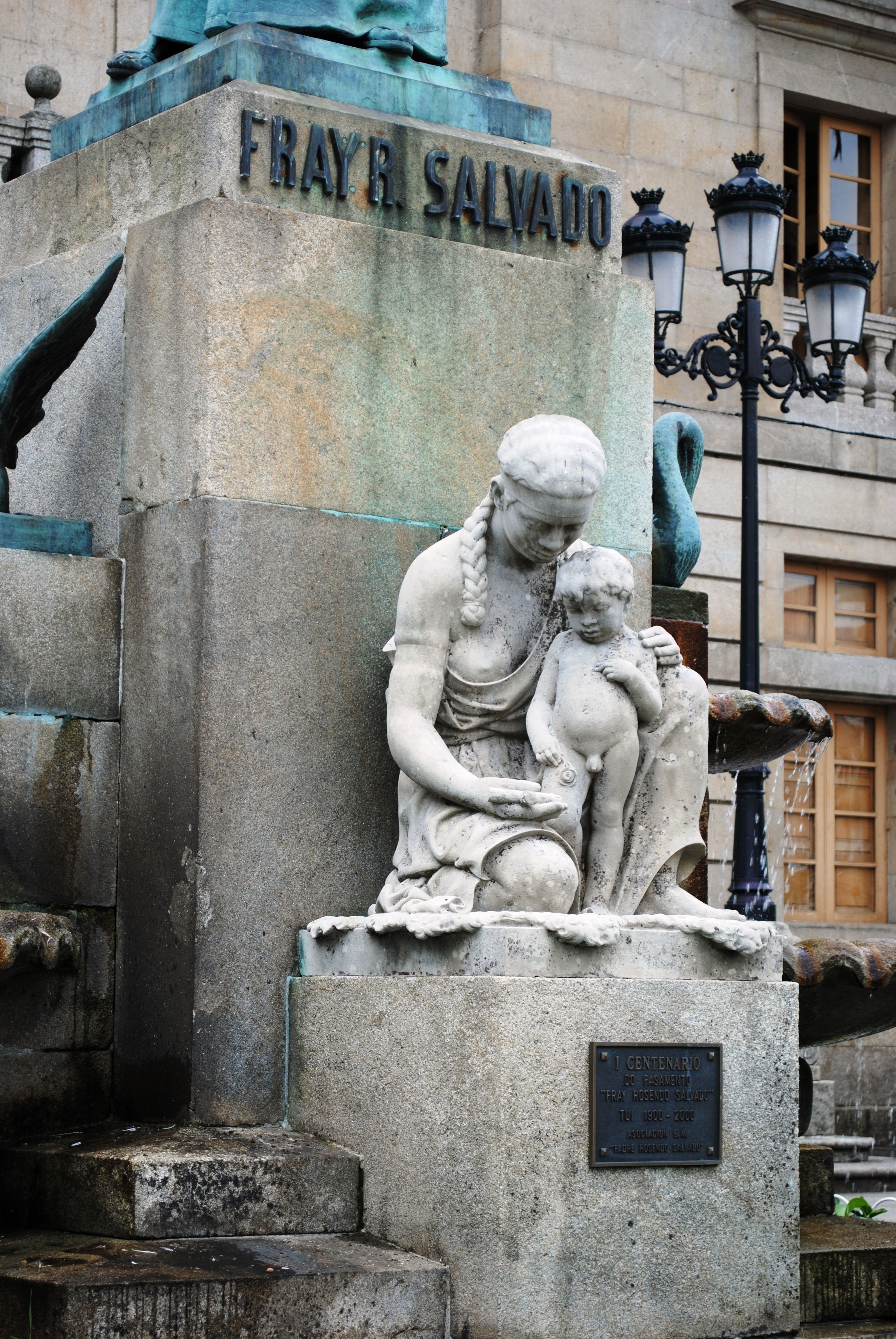 Plaque: "En gratitude ao tudense Frei Rosendo Salvado polo traballo apostólico e o inmenso labor realizado cos aborixes australianos no CLX aniversario da fundación de Nova Nursia. In gratitude to the tudense Fr. Rosendo Salvado for his dedication and apostolic work with the aborigines in New Norcia, Australia, on this 160th anniversary. Sendo embaixador de Australia en España o Excmo. Sr. Noel Campbell e alcalde de Tui o Ilmo. Sr. D. Antonio F. Fernández Rocha. Xuño 2007"